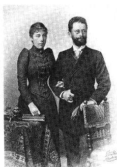 Hochzeit Max Littmann und Ida Heilmann